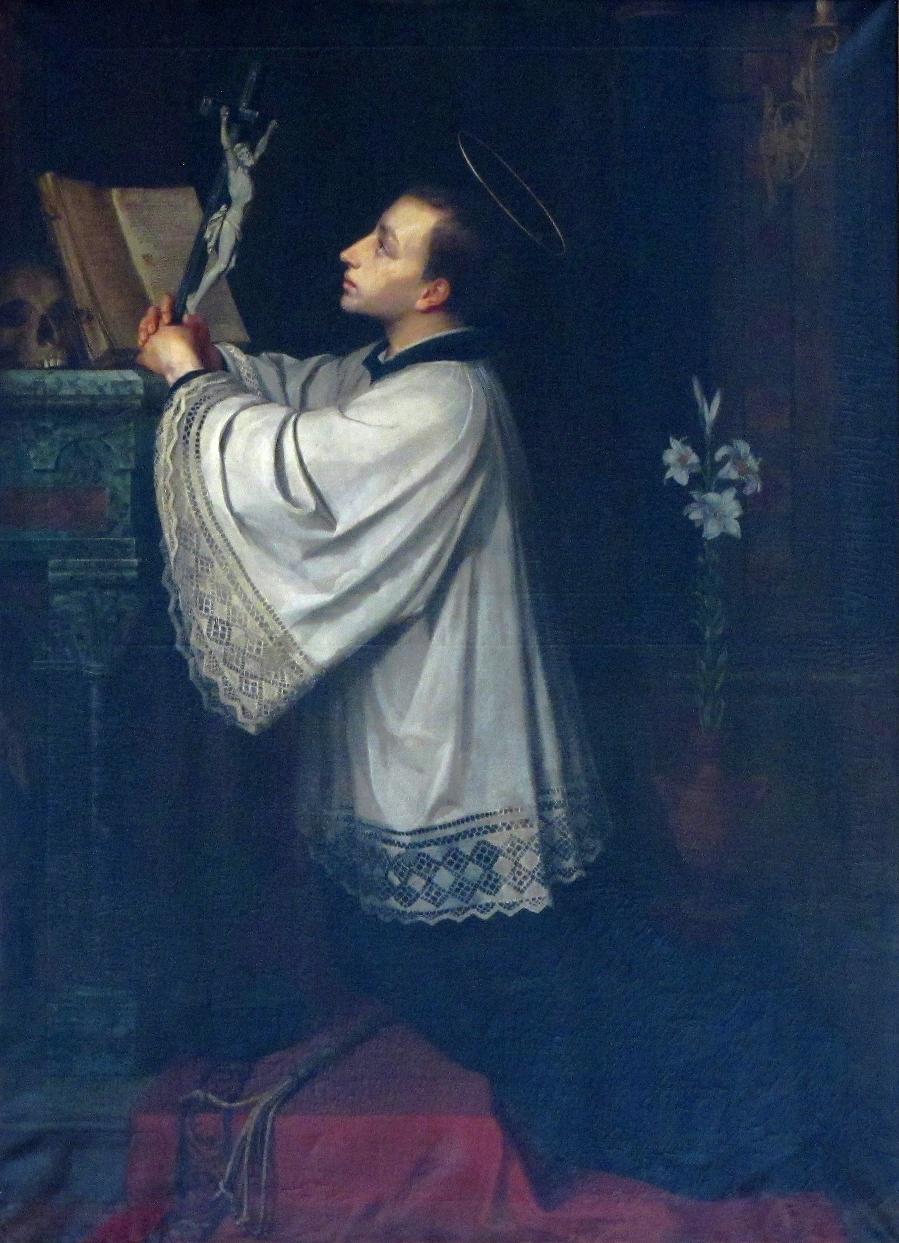 Alsace, Bas-Rhin, Église de la Sainte-Trinité de Lauterbourg (PA00084770, IA67008823). Tableau "St-Louis de Gonzague" (Heinrich BURCKHARDT (1853-1912), huile sur toile, 191cm de large, 1877)